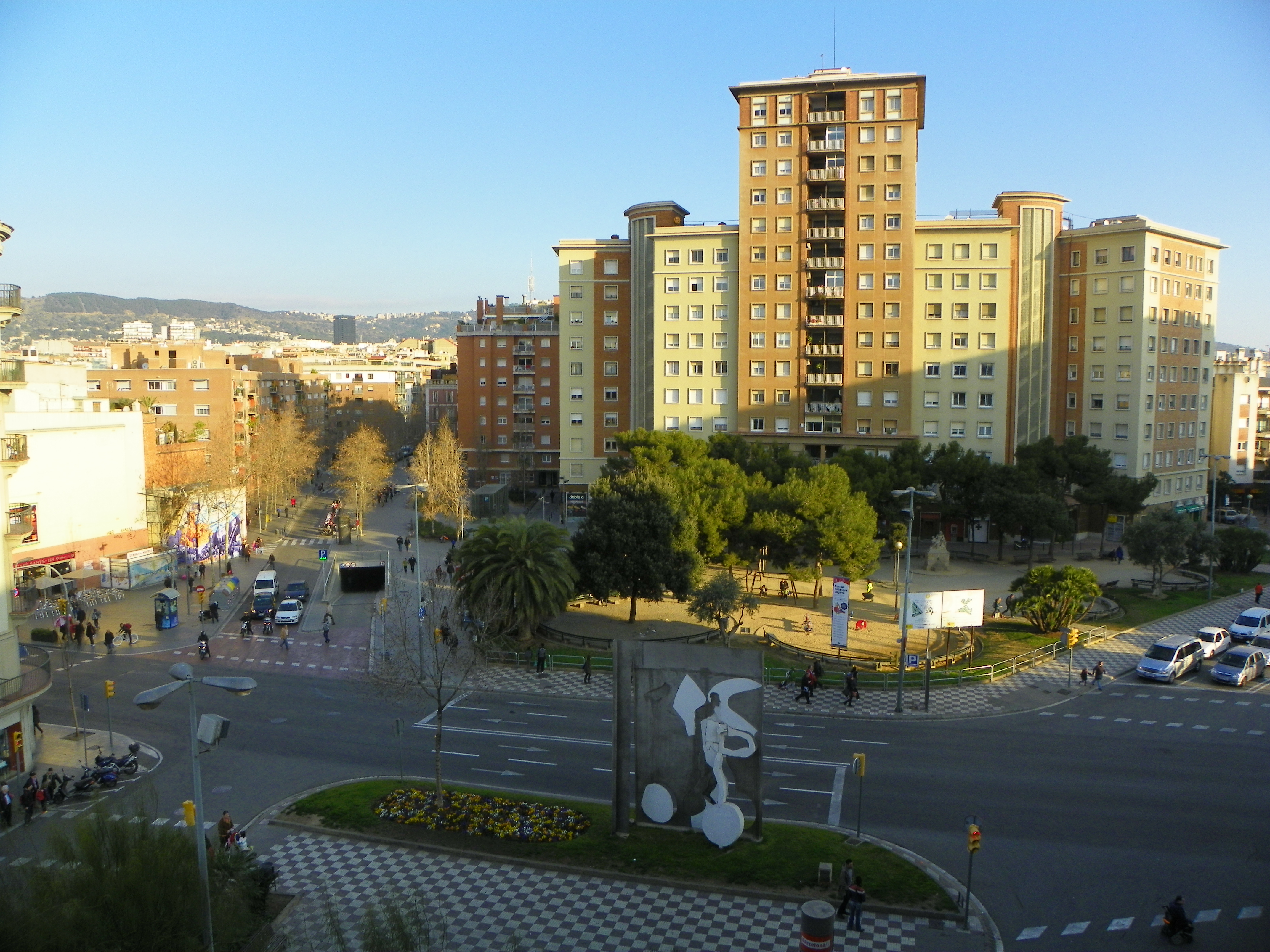 Barcelona, España